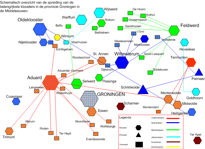 Zelf getekende kaart. Deze kloosterkaart van Noord-Groningen geeft op schematische wijze de spreiding van de belangrijkste kloosters en hun voorwerken in de periode 1200-1600. Er zijn in die periode meer kloosters geweest, maar dit overzicht is beperkt tot de kloosters die een grote activiteit aan de dag hebben gelegd bij het in cultuur brengen van de grond in dit deel van Nederland. De gegevens voor deze kaart zijn voornamelijk ontleend aan het werk van Schoengen (1941-42), terwijl gegevens over het grondbezit ontleend zijn aan Feith (1902). Deze gegevens zijn verder aangevuld met data uit de Nieuwe Groninger Encyclopedie (1999). Deze versie wijkt af van die bekend onder de naam Kloosterkaart Noord Groningen, omdat in deze kaart Ter Apel is toegevoegd. In deze versie is een wijziging aangebracht in de legenda. Noord-Groningen is vervangen door provincie Groningen